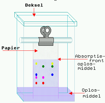 TLC (Thin Layer Chromatography) tank (schematisch).